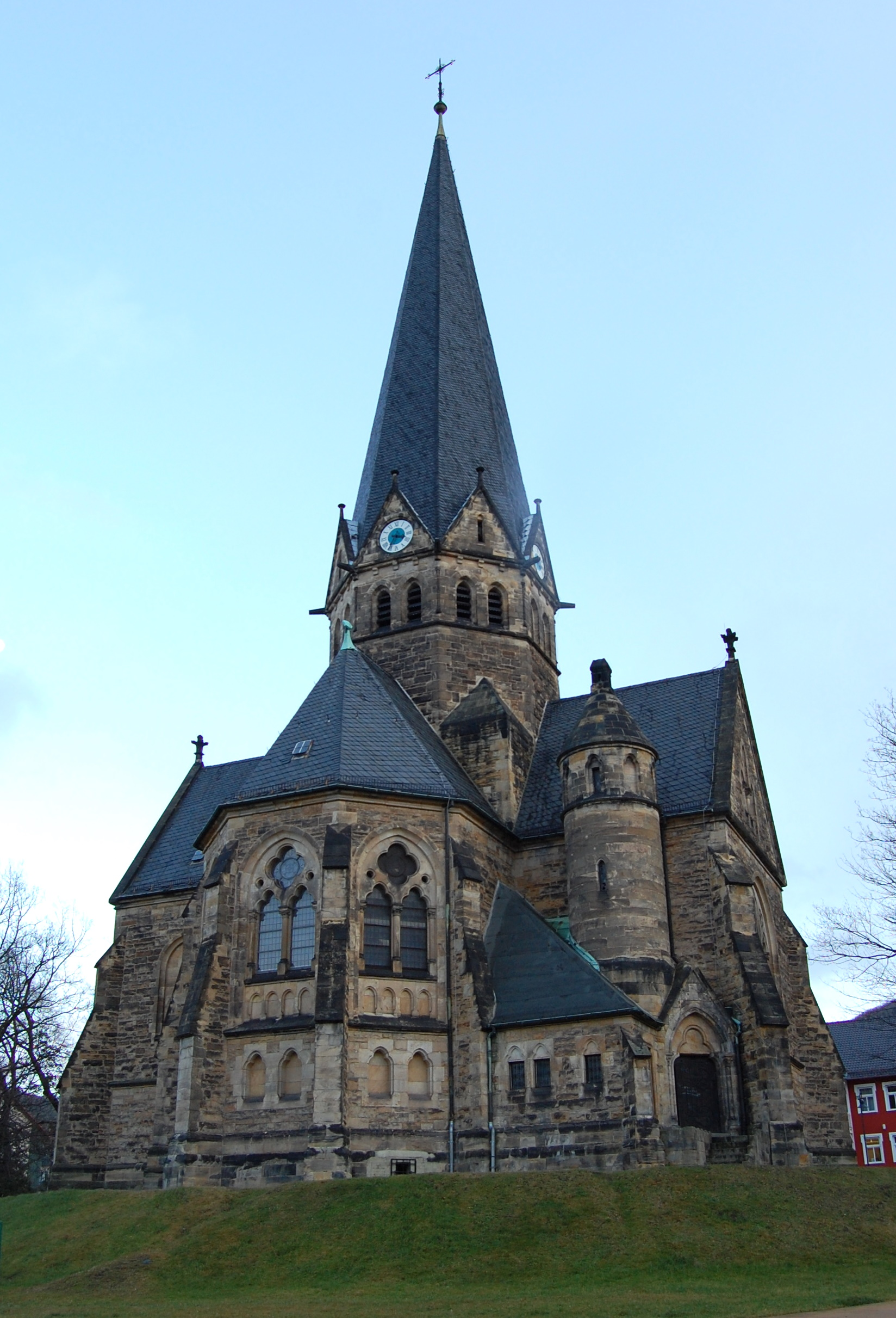 Sankt-Petri-Lirche in Thale